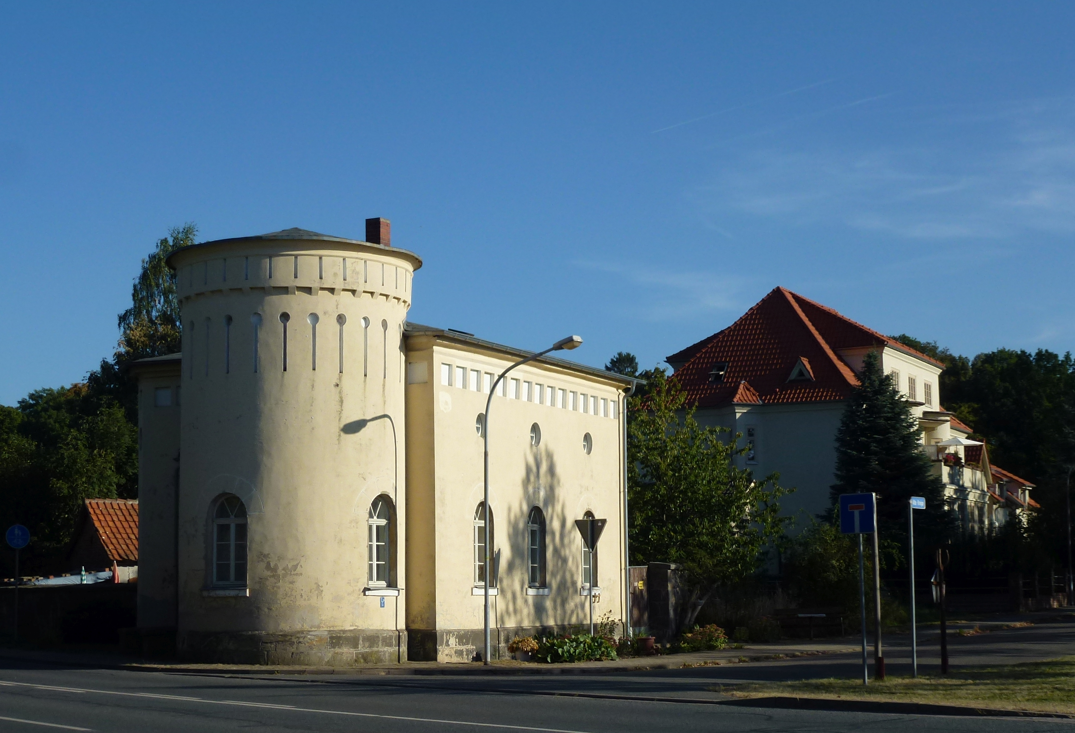 Gelbes Haus in Ballenstedt, Quedlinburger Straße 11b, mit Blick in die Alte Kreipe.